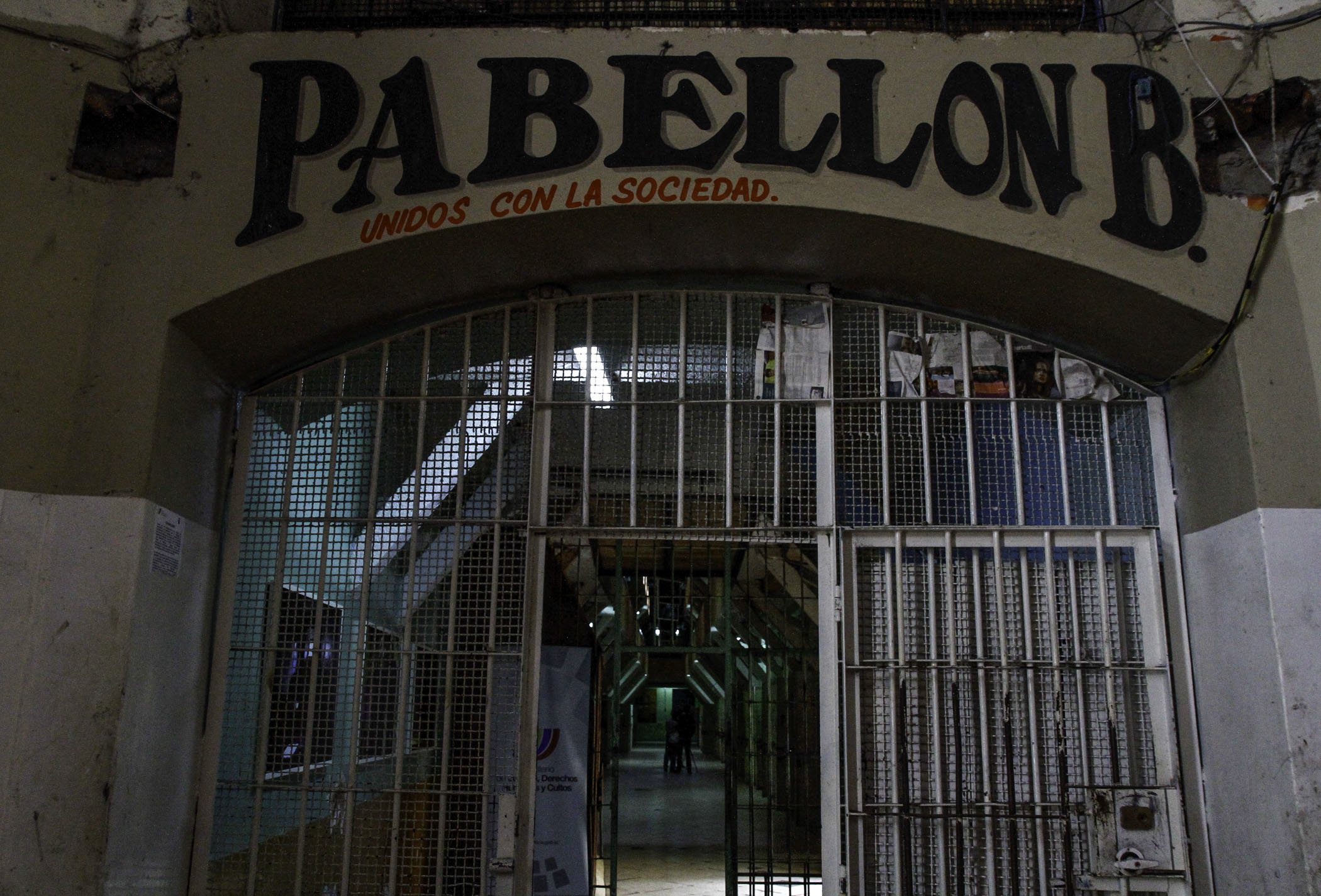 Quito, Ecuador, 20 dic (ANDES).- El Ministerio de Justicia, Derechos Humanos y Cultos presentó la exposición fotográfica "Espacios Verdes" cuyo escenario es el ex-Penal García Moreno. Esta exposición devela lo que dejaron las personas privadas de la libertad antes del cierre de este recinto carcelario. Foto: Micaela Ayala V./ANDES